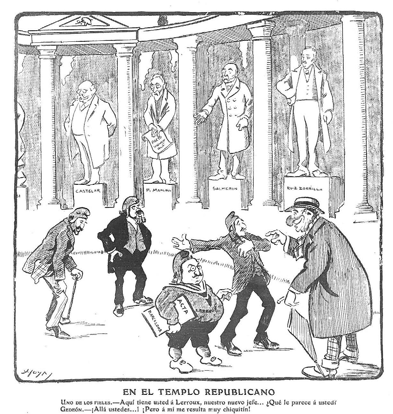 En el templo republicano, en la revista satírica española Gedeón.